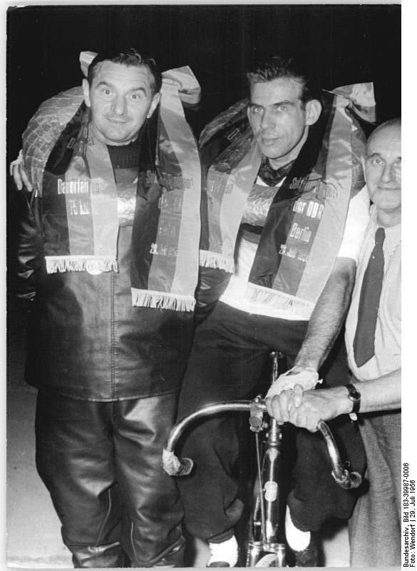 Zentralbild Wendorf 29.7.1956 Bey-Ka. DDR-Meisterschaften im Radsport Am Sonnabend, dem 28.7.1956, wurden auf der Radrennbahn in Berlin Weissensee die DDR-Meisterschaften im Bahnfahren fortgesetzt. Den Titel im Dauerfahren holte sich der Favorit Bruno Zieger (Post Berlin) vor Stammer und Keil. Im 1000-m-Malfahren sicherte sich der Titelverteidiger Jürgen Simon (Einheit Berlin) vor Stäber (Dynamo Berlin) erneut die Meisterschaft. UBz:Auch in diesem konnte Bruno Zieger wieder DDR-Meister im Dauerfahren über 75 km werden. vlnr Schrittmacher Aurich, Bruno Zieger und ihre Betreuer während der Siegerehrung.